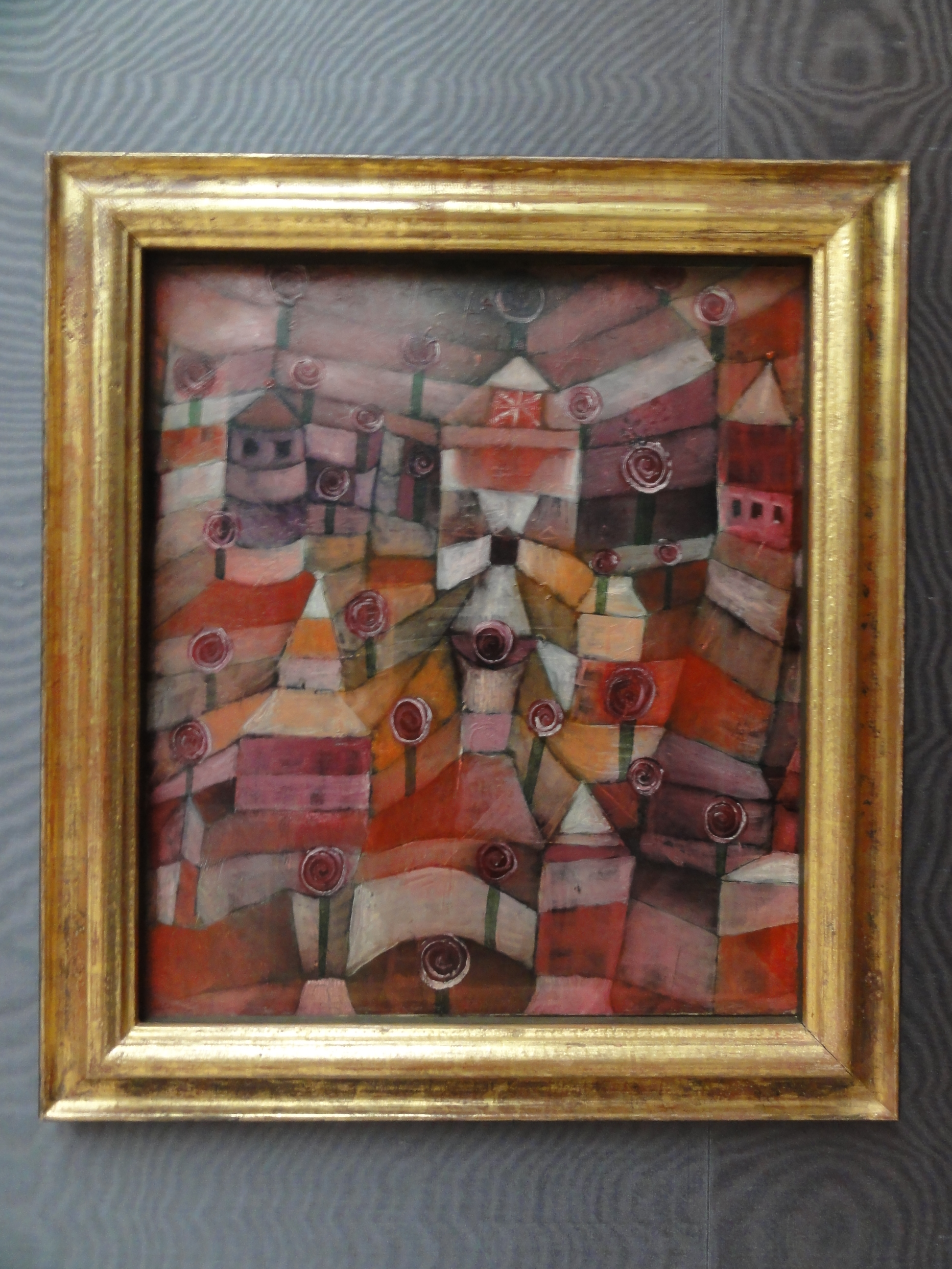 Rosengartentitle QS:P1476,de:"Rosengarten" label QS:Lde,"Rosengarten"